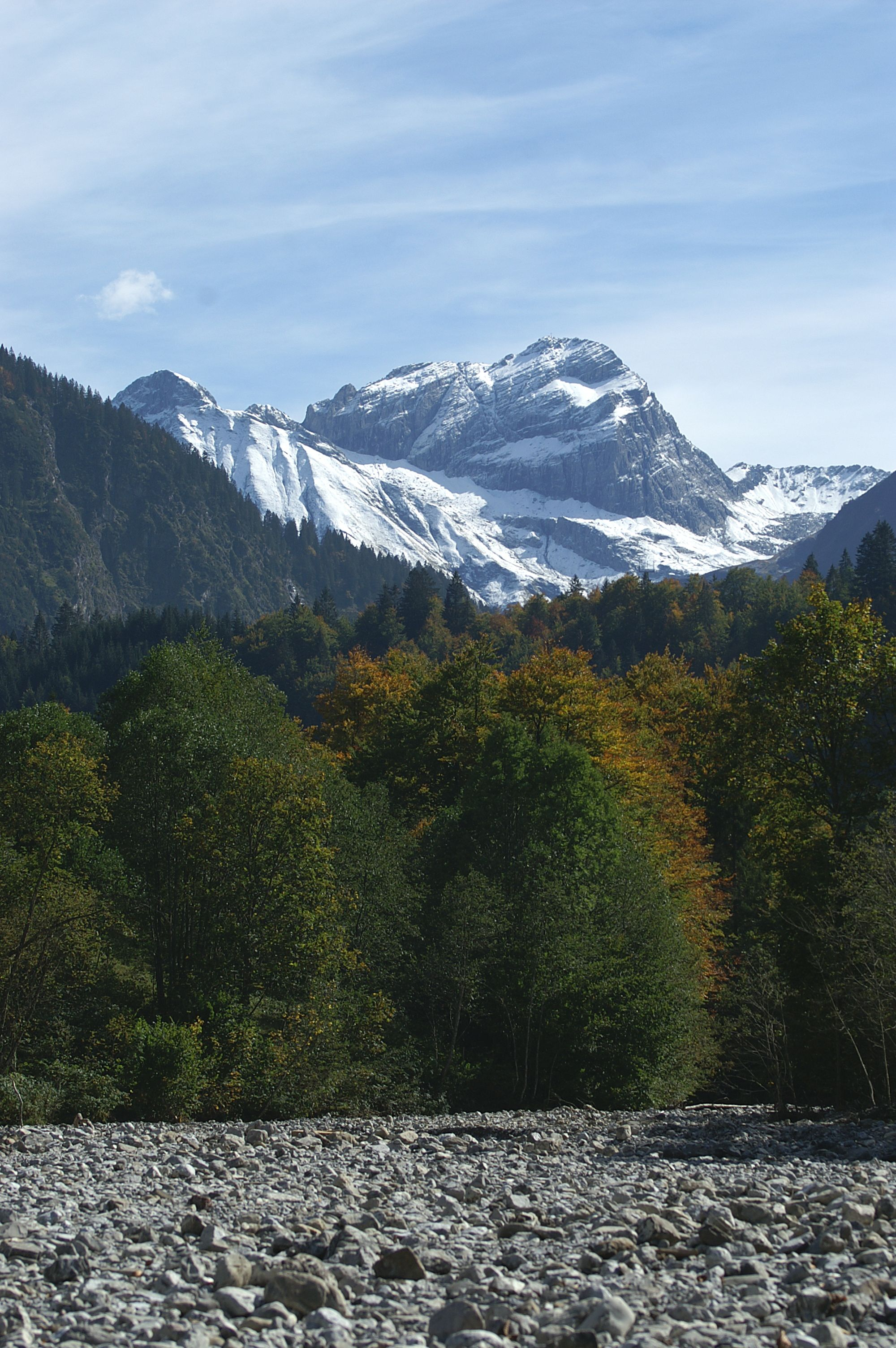 die Mohnenfluh 2542m im Schröcken, Quell der Bregenzer Ache, Blick von Schoppernau